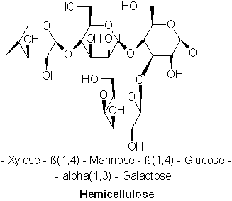 Hemicellulose